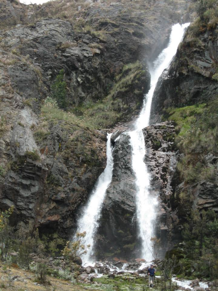 Catarata Ismaypampa